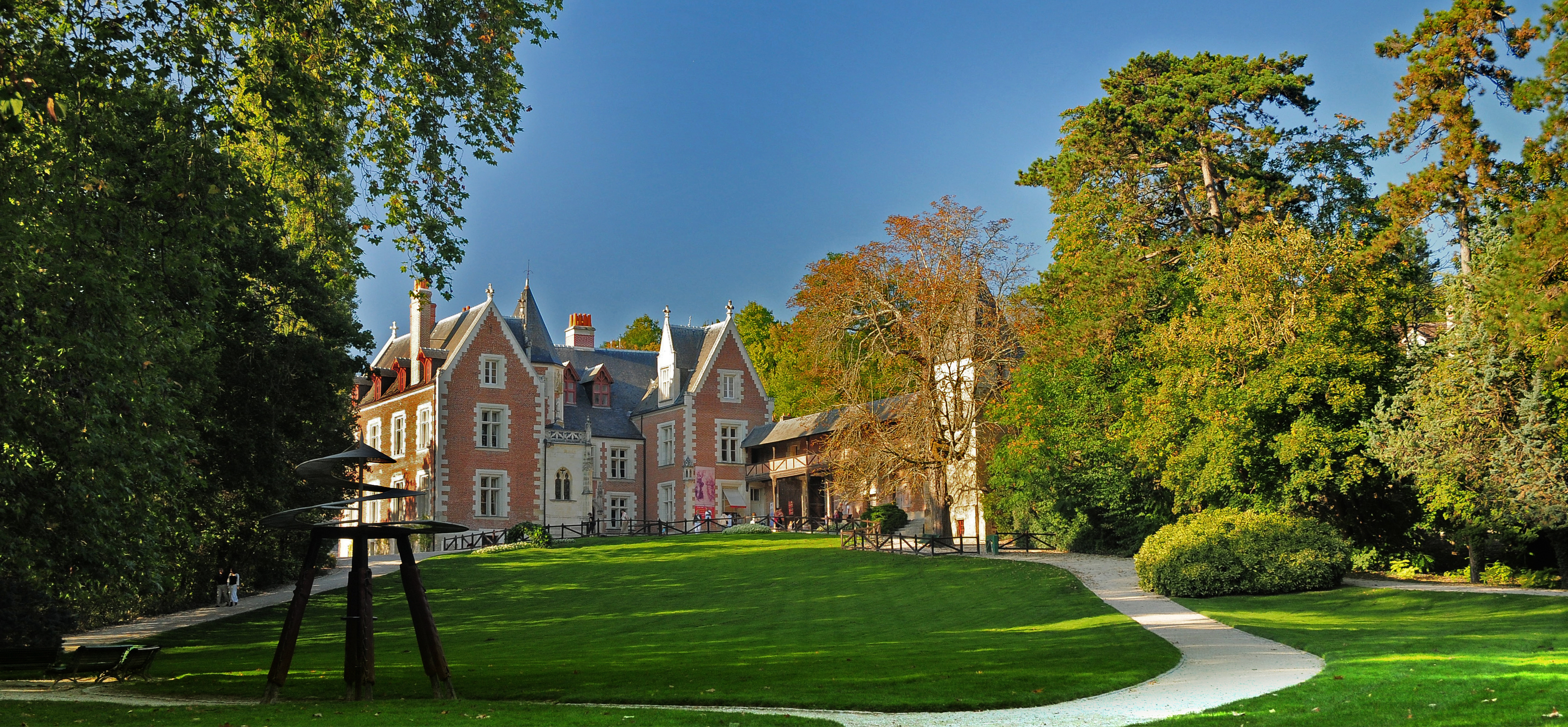 Le Château du Clos Lucé Vue extérieure